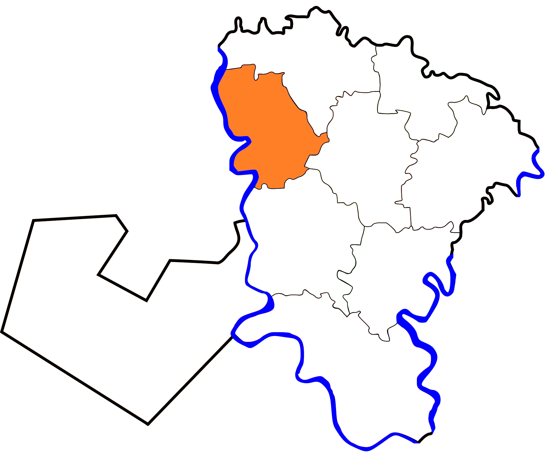 خريطة مركز الشهداء بالنسبة لمحافظة المنوفية، مصر.